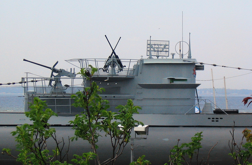 Beschreibung: U 995 - Turm Fotograf: Darkone, 1. Mai 2004